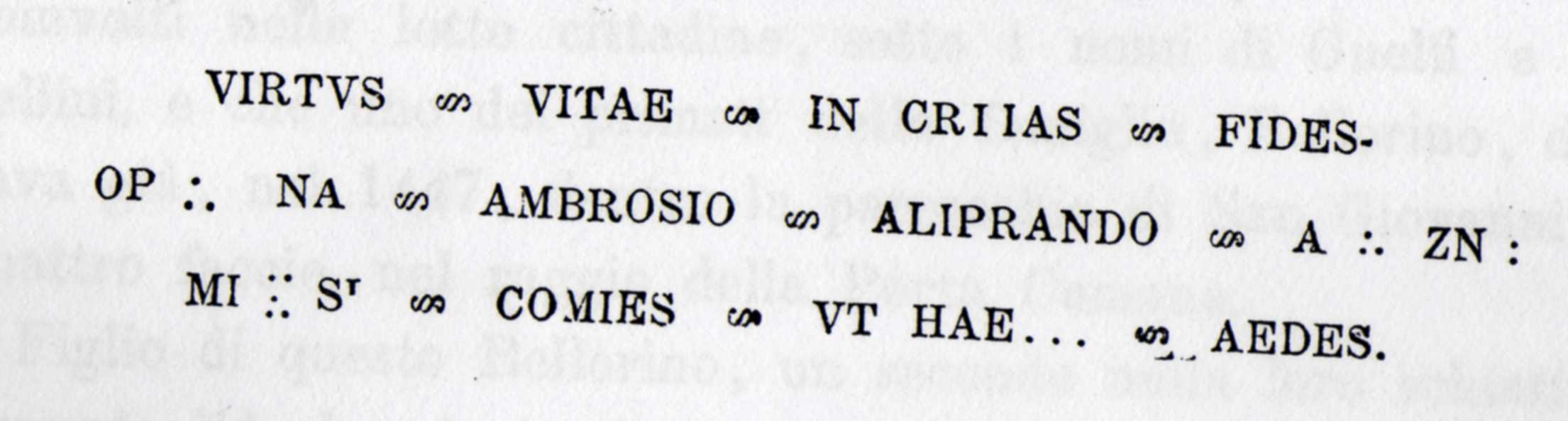 Iscrizione nel Palazzo Bigli